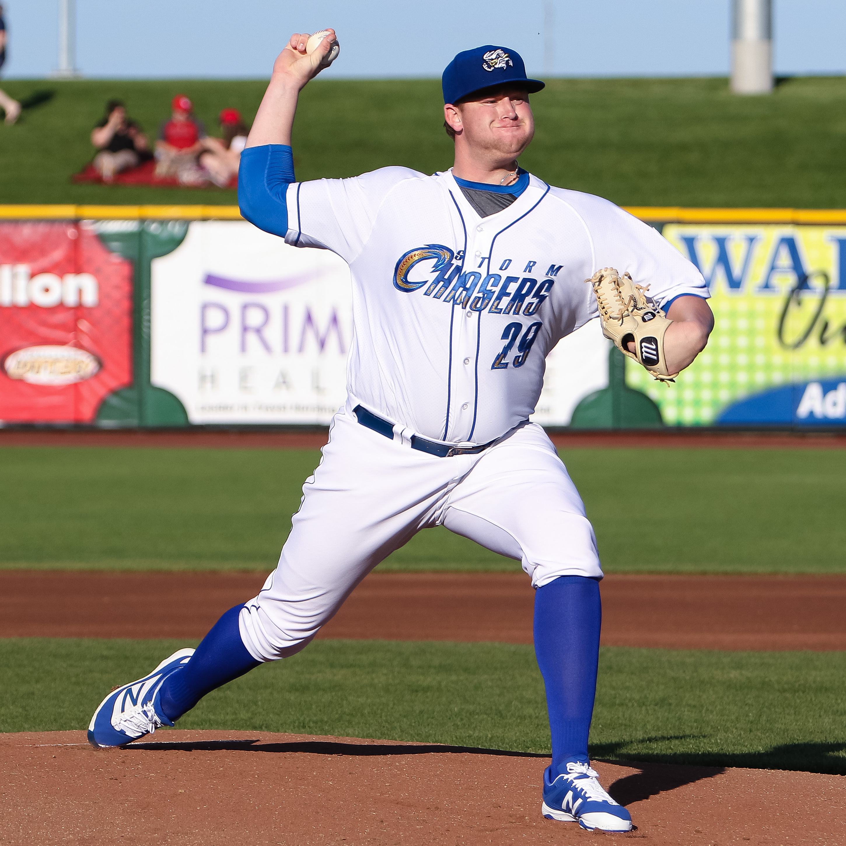 Brooks Pounders